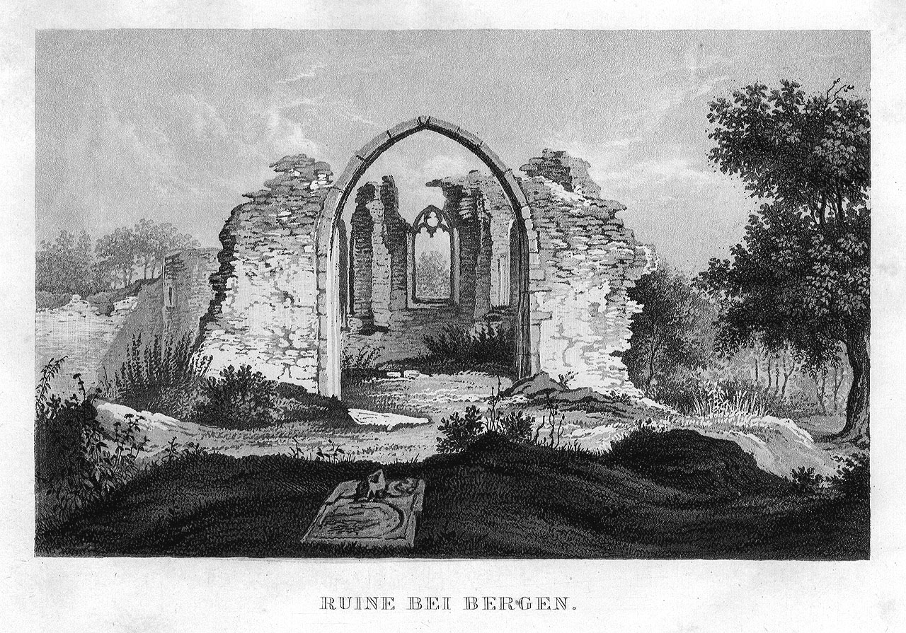 Friedrich Philipp Usener: Beiträge zu der Geschichte der Ritterburgen und Bergschlösser in der Umgegend von Frankfurt a/M (1852) - zeigt vermutlich die Hubertuskapelle als Ruine in Frankfurt-Bergen-Enkheim.